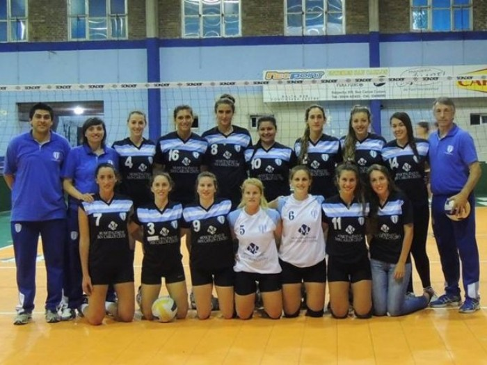 Equipo de Voleibol de Argentino de San Carlos